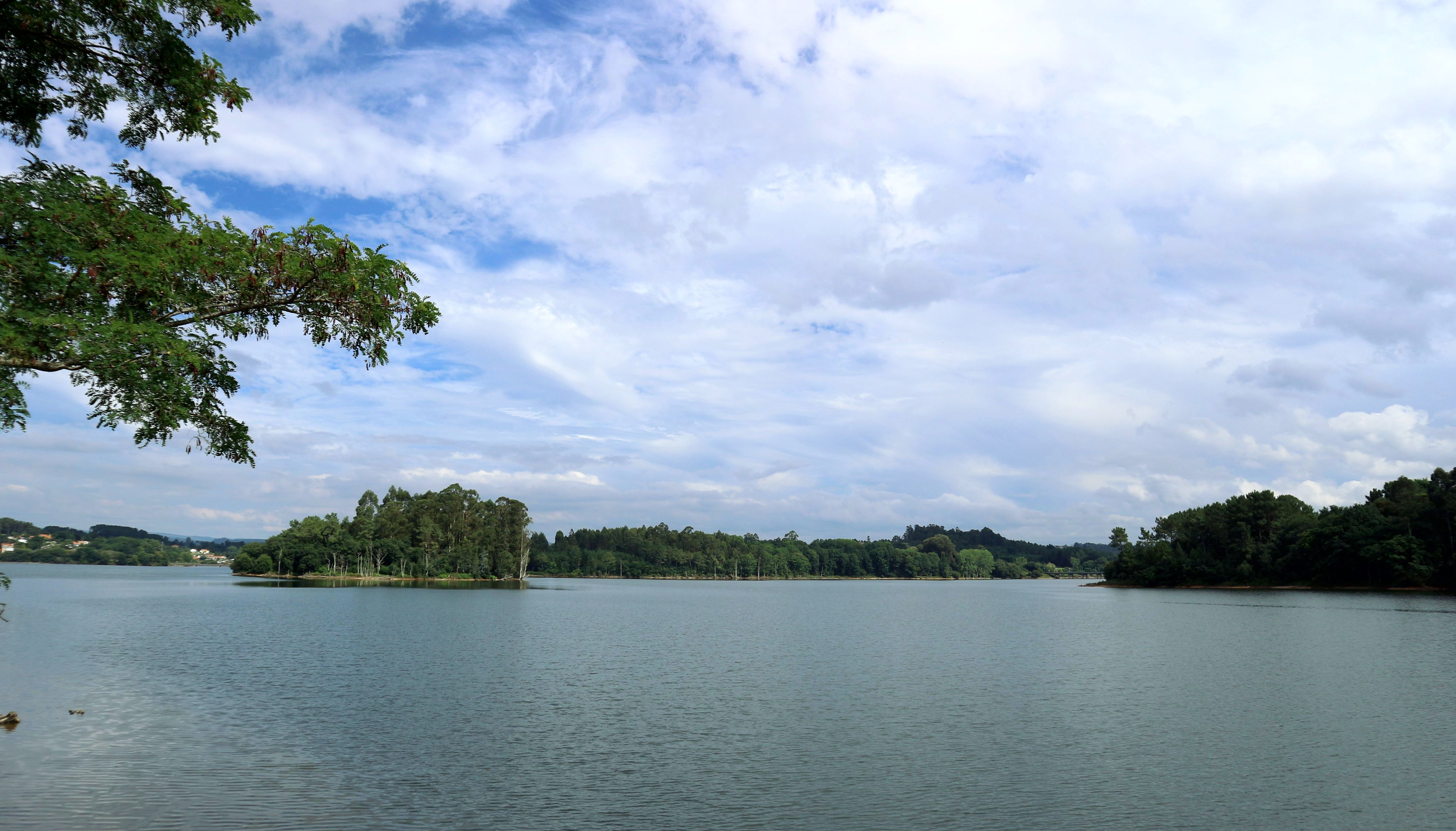 Orto, Abegondo. Encoro de Abegondo - Cecebre.